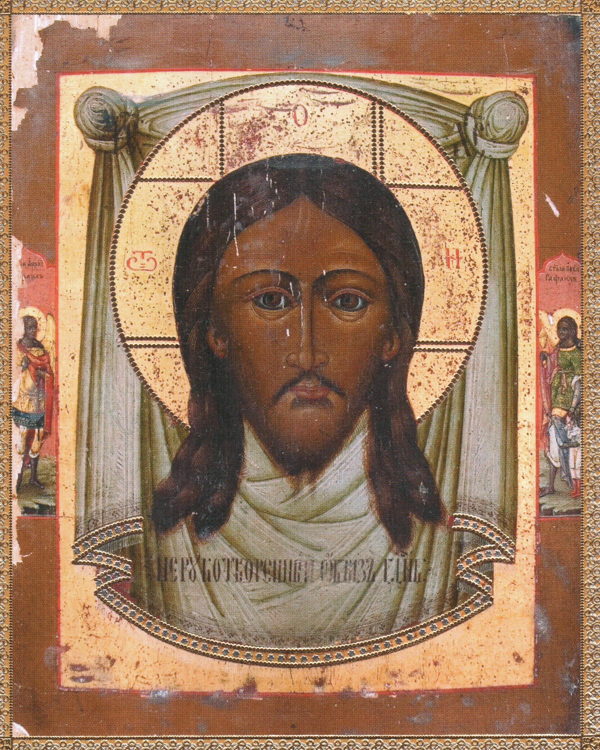 Нерукотворенный Образъ Г(оспо)день. Обновившаяся 20 июля 1997 года старая икона Спаса Нерукотворного (Водяное, Змиевской район, Борисоглебский монастырь). Слева на полях изображён С(вя)тый Архис(тратиг) Михаил, справа - С(вя)тый Арх(анге)л Рафаил.